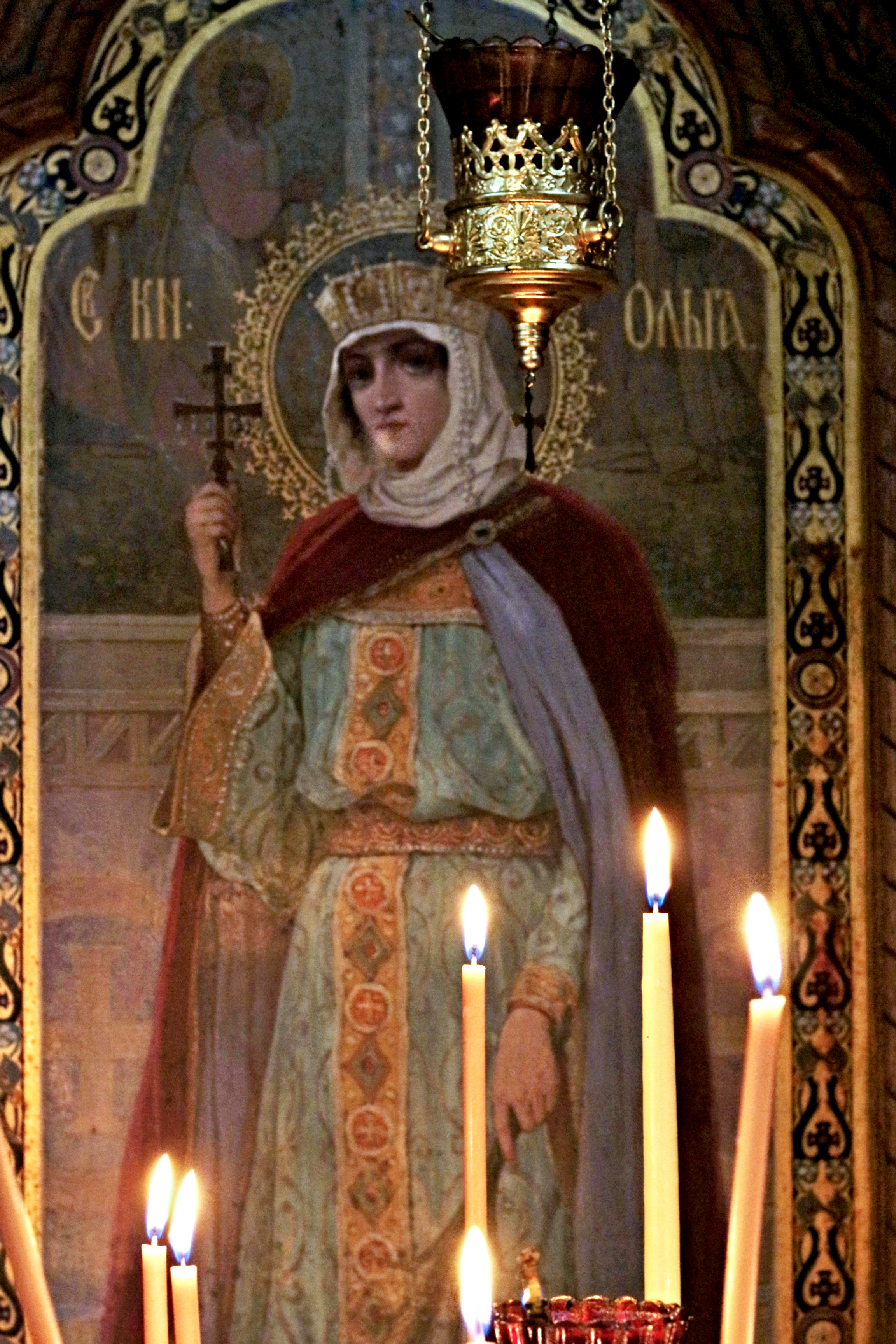 Interiér chrámu svaté kněžny Olgy ve Františkových Lázních